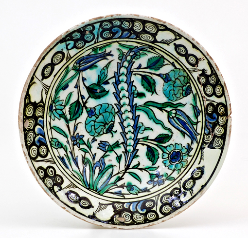 Piatto con decoro floreale. Iznik, fine del XVI secolo.